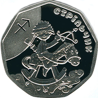 Стрільчик реверс